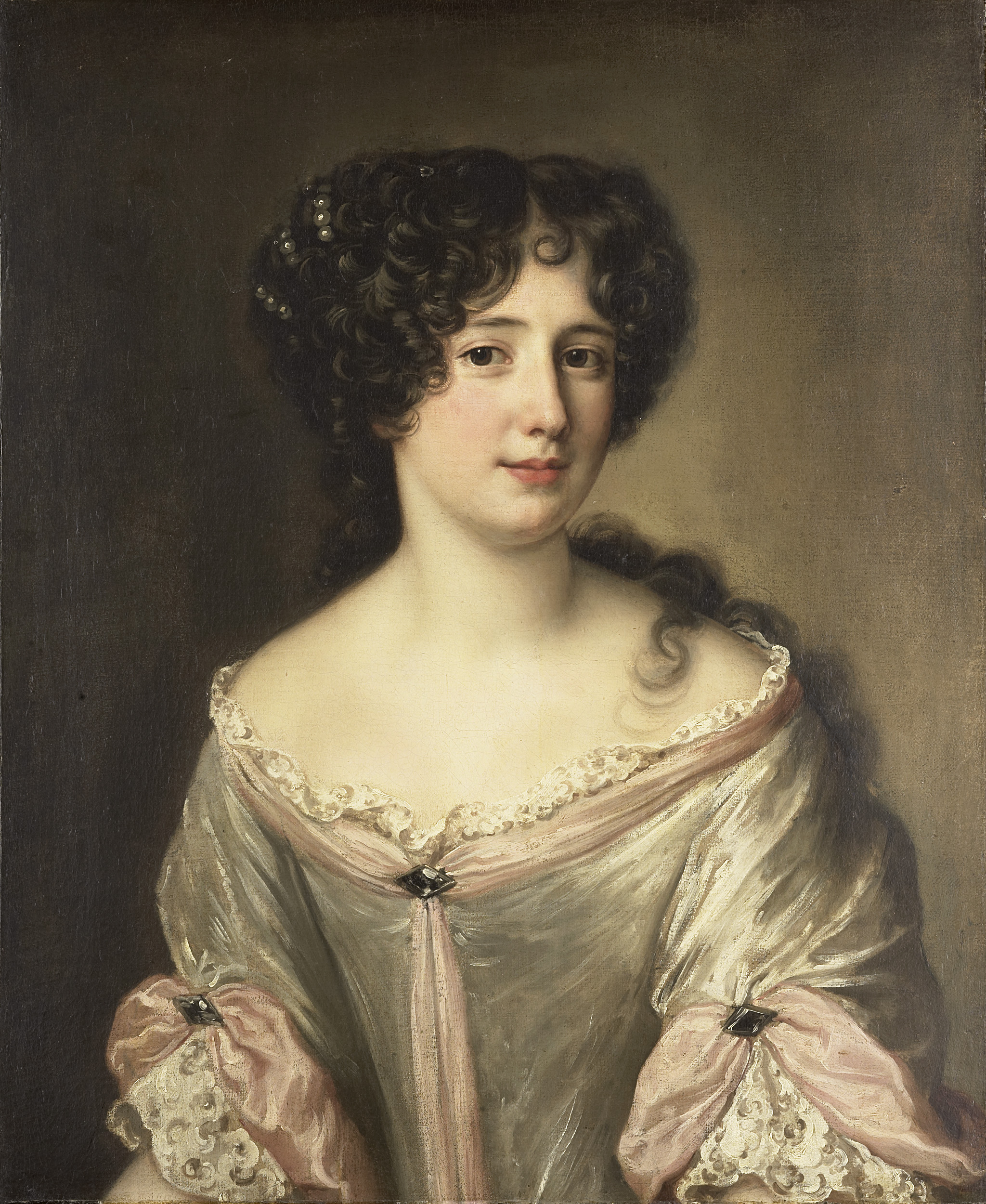 Portret van Maria Mancini (1639-1715), hertogin van Bouillon. Ten halven lijve, en face.